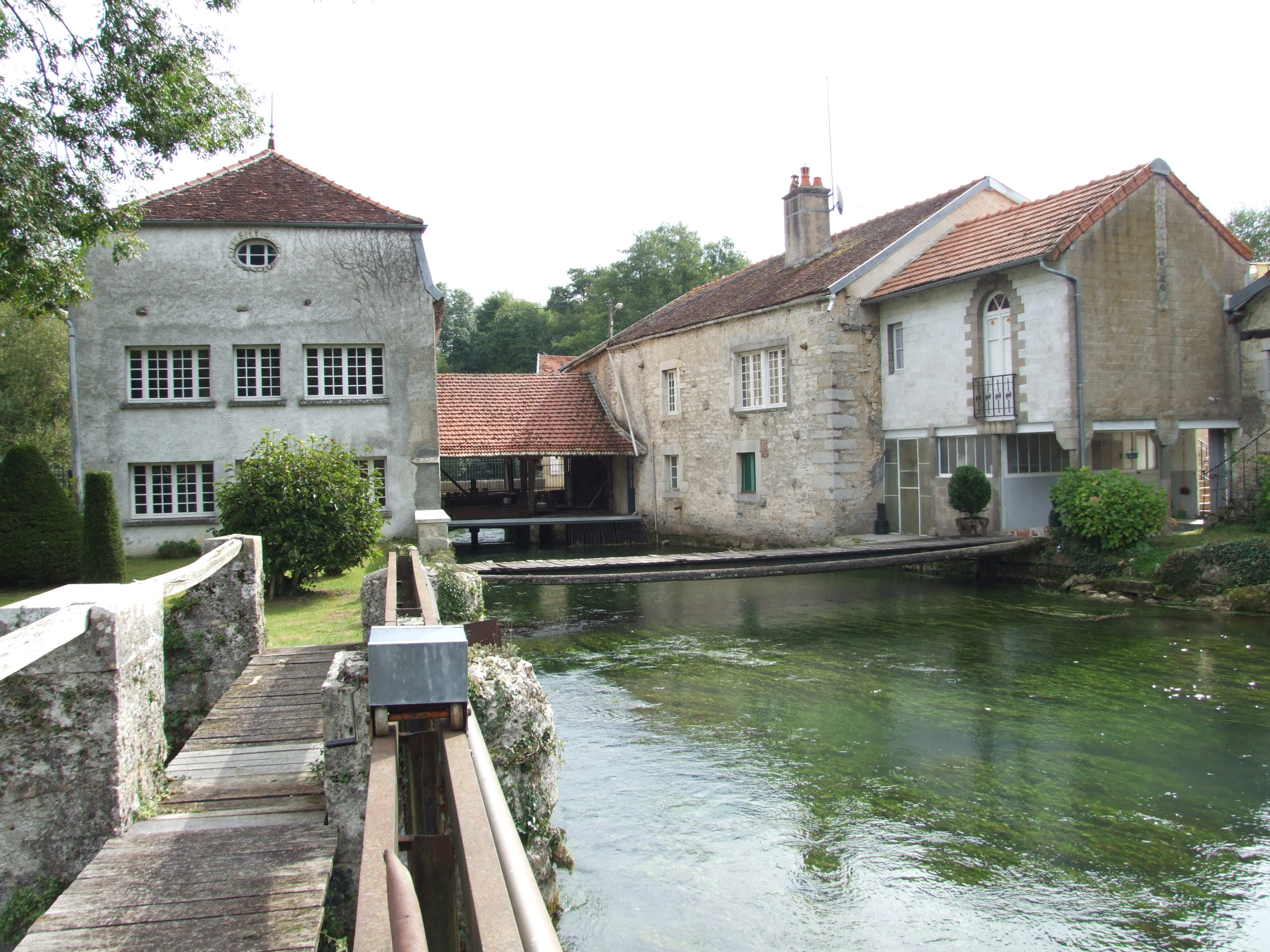 Noiron-sur-Bèze, Côte-d'Or, Bourgogne, FRANCE